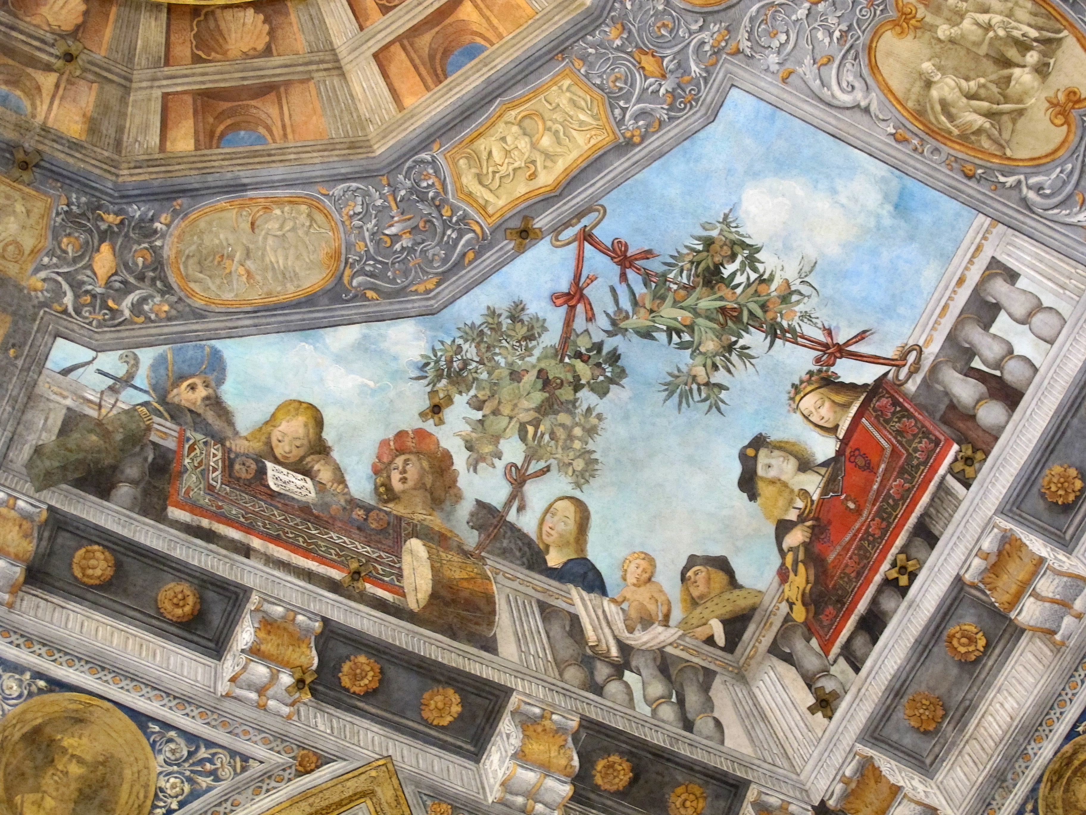 Museo Archeologico Nazionale - MIBAC This is a photo of a monument which is part of cultural heritage of Italy.